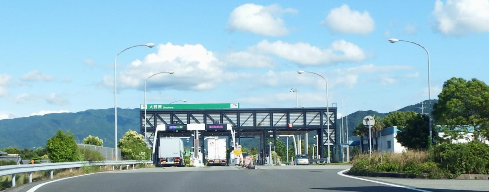 大野原インターチェンジの乗り口